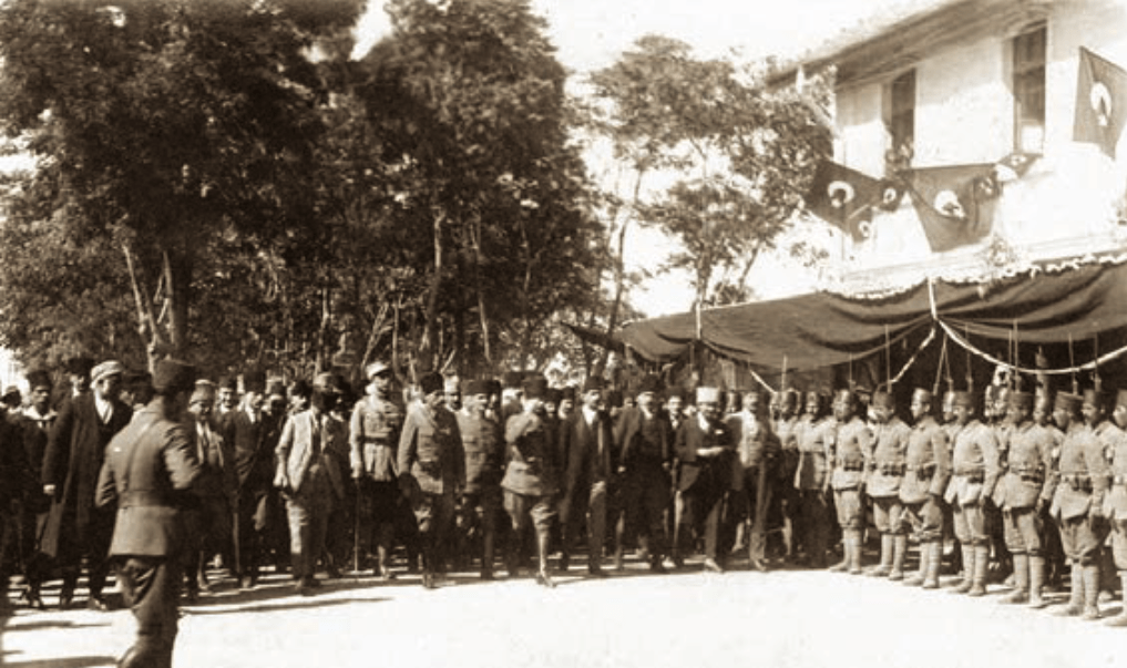 Mustafa Kemal Paşa’nın Büyük Taarruz ve Başkomutanlık Meydan Muharebesi’nden sonra Ankara’da karşılanışı, Ankara, 2 Ekim 1922